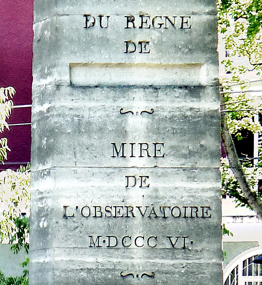 Parc Montsouris (texte inscrit sur la mire du sud) - Paris XIV. Le nom de Napoléon a été martelé.